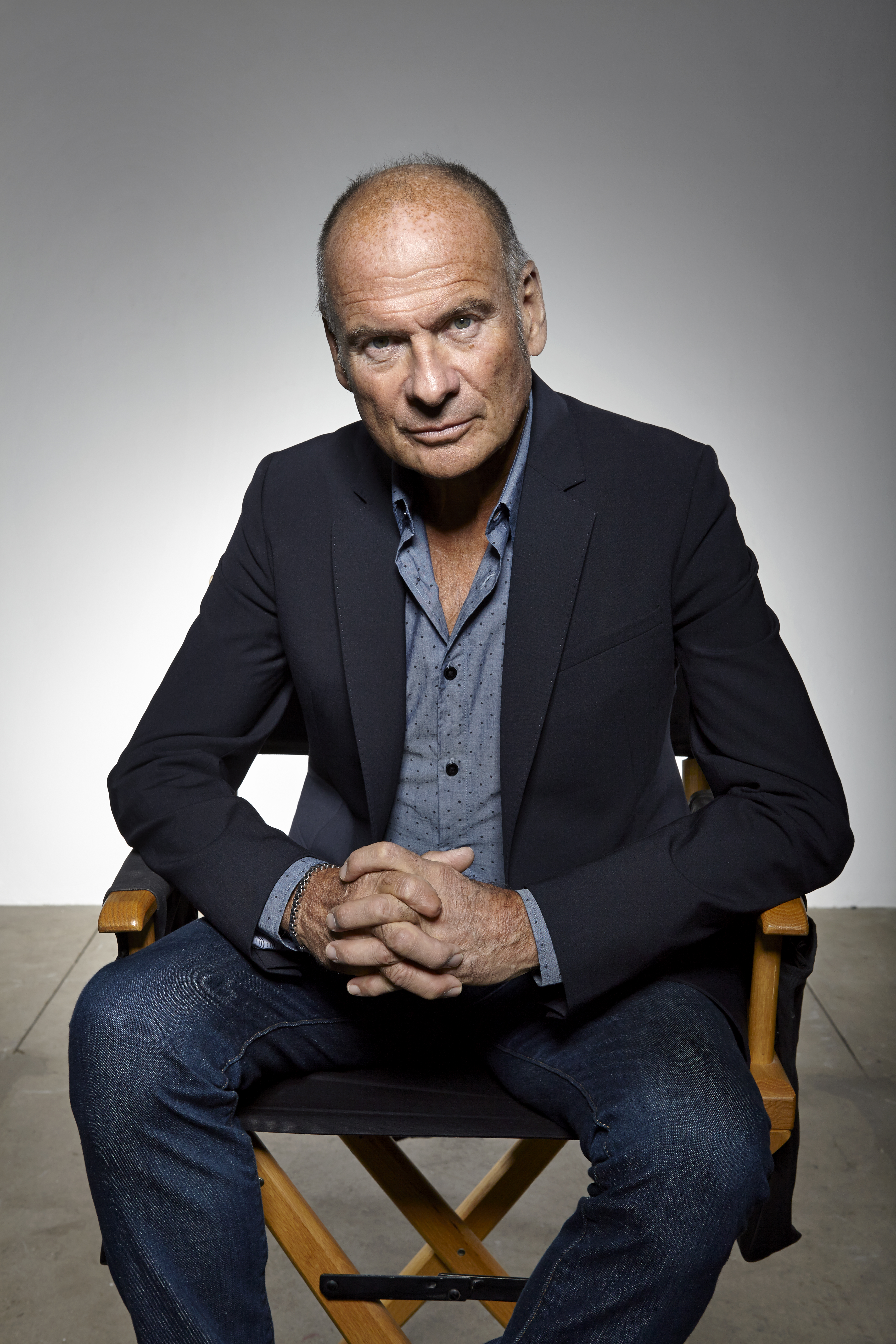 Artisten och låtskrivaren Lasse Holm.